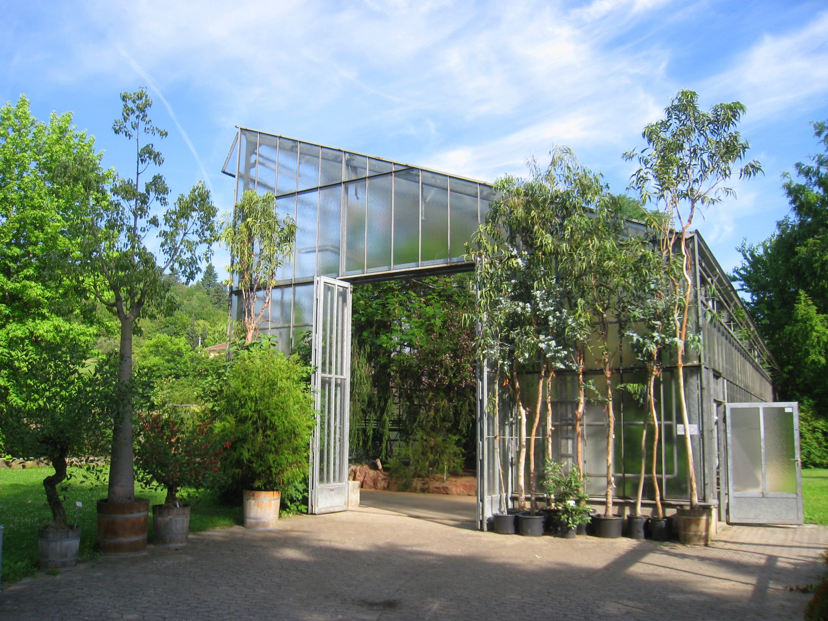 Mediterranean house exterior view - Botanischer Garten der Universität Würzburg, Würzburg, Germany.